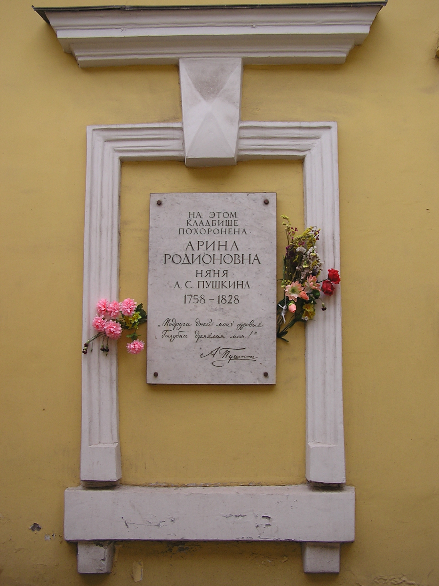 Санкт-Петербург. Смоленское православное кладбище. Мемориальная доска в честь Арины Родионовны